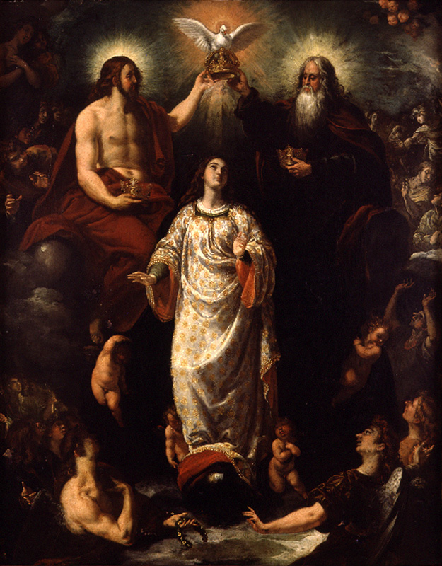 La obra representa a la Virgen María siendo coronada por los tres miembros de la Santísima Trinidad.